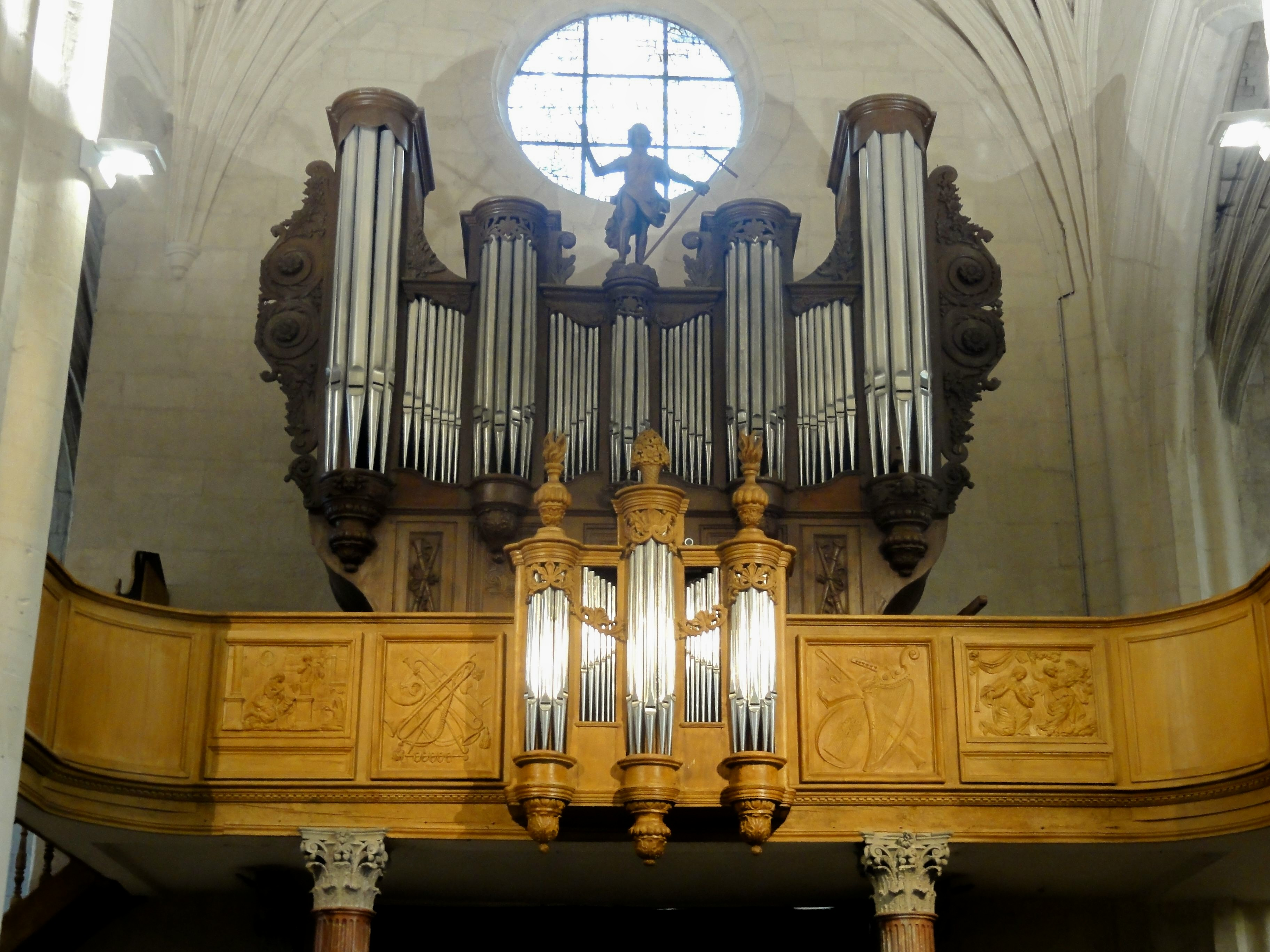 Orgue de tribune de 1643, acquis en 1806, en provenance de la chapelle de l'hôtel-Dieu de Noyon.